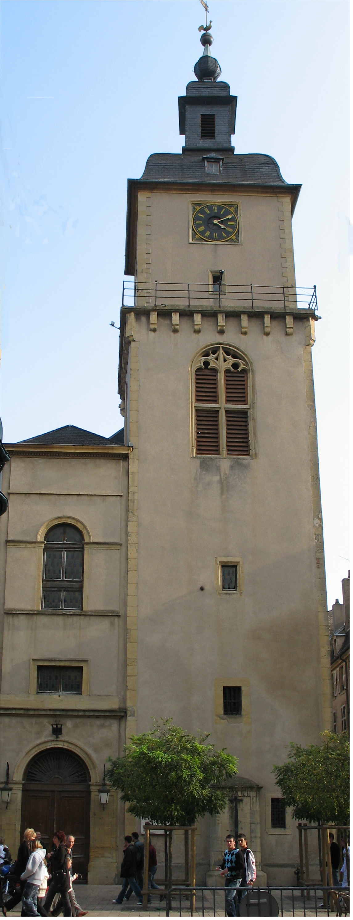 Beffroi zu Diddenuewen